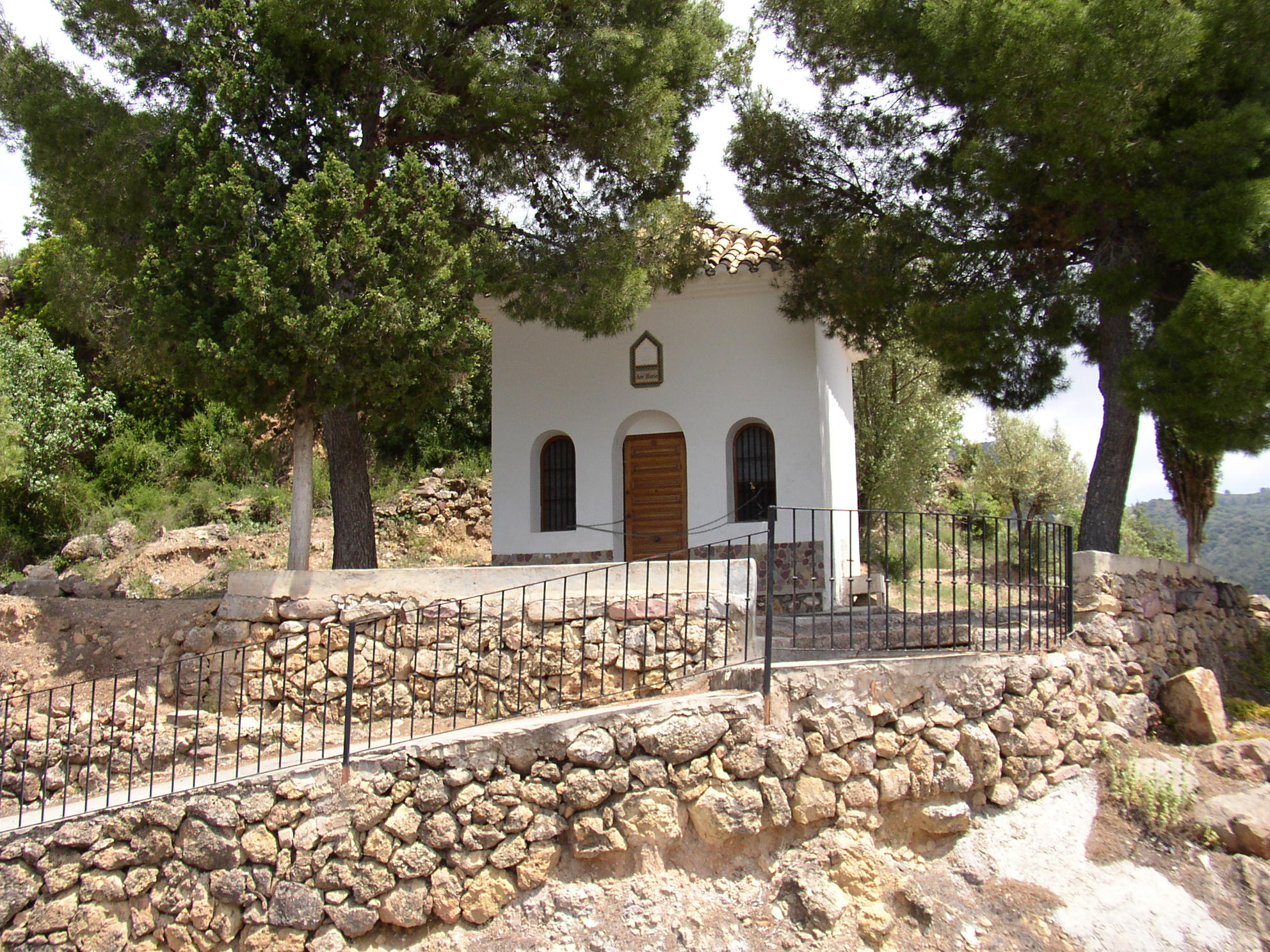 Castellón (Comunidad Valenciana) España. Algimia de Almonacid. Ermita. Fotografía realizada el 19 mayo de 2006 por el autor User: Pelayo2